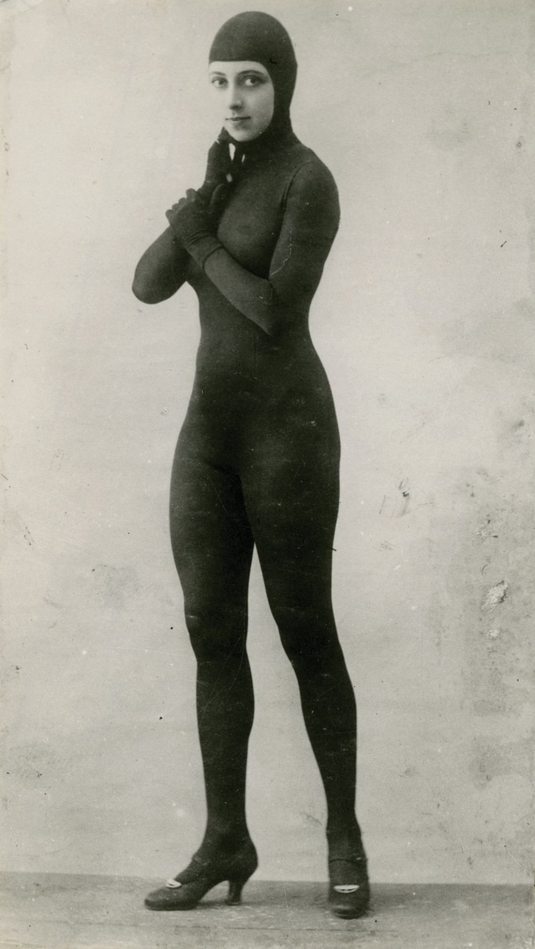 Photo publicitaire de Musidora dans son rôle d'Irma Vep vêtue de son collant noir iconique (Les Vampires de Louis Feuillade, 1915).